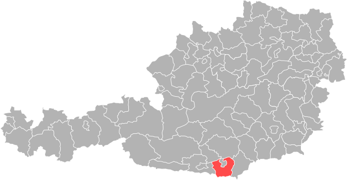 Bezirk Klagenfurt-Land in Österreich